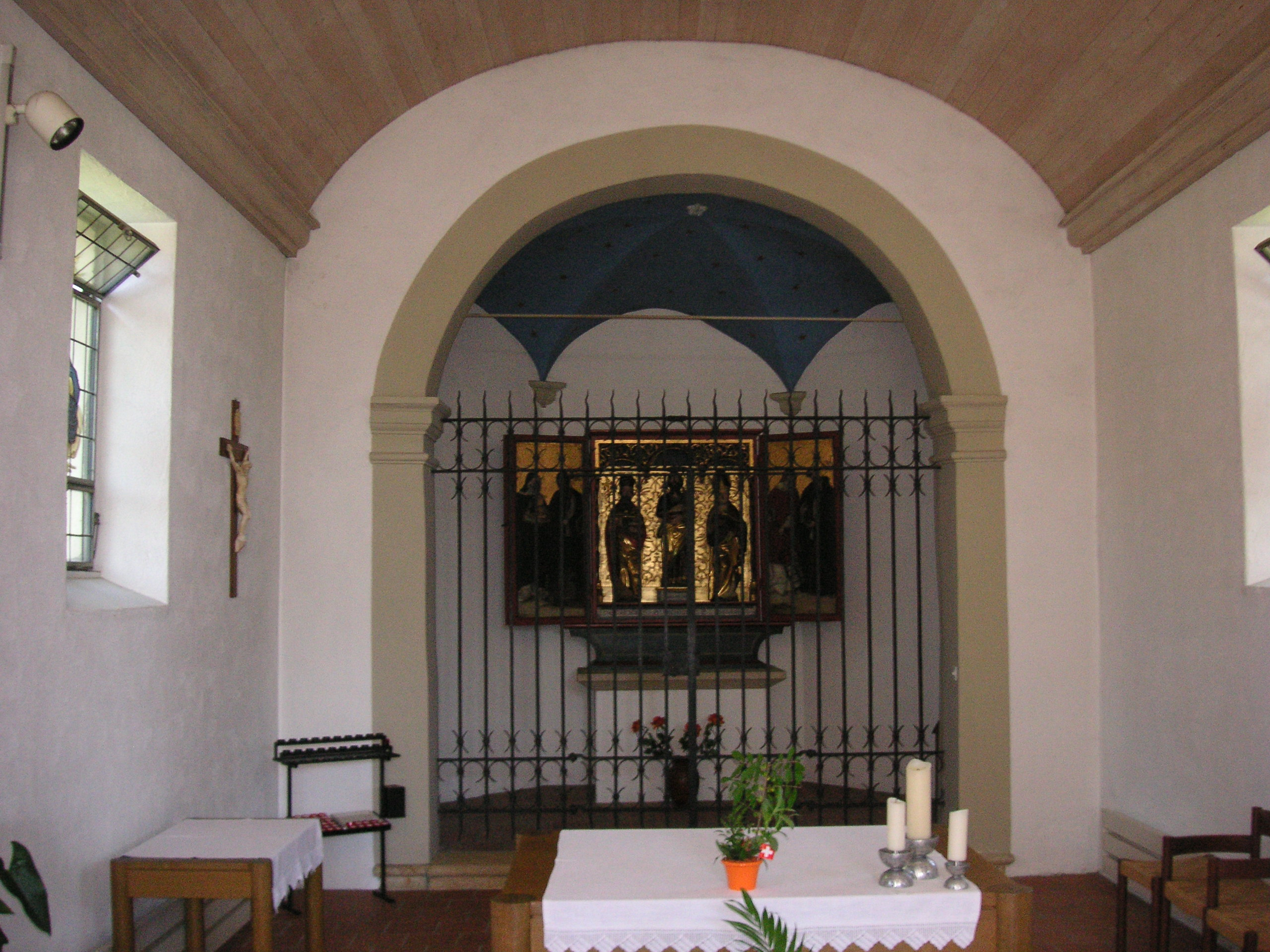 Inneres der Kapelle Staad, Nähe Grenchen an der Aare